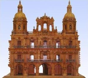 Maqueta de 1745 del ayuntamiento de Salamanca/Model of the Salamanca City Hall